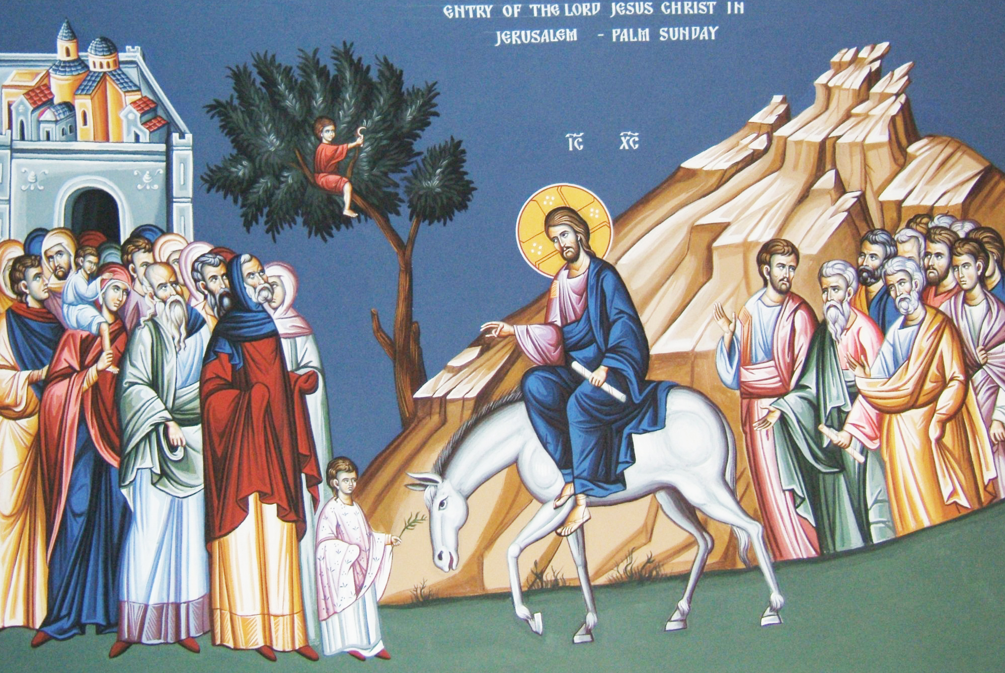 დიდებით შესვლა იერუსალიმში. სერბული ხატი.